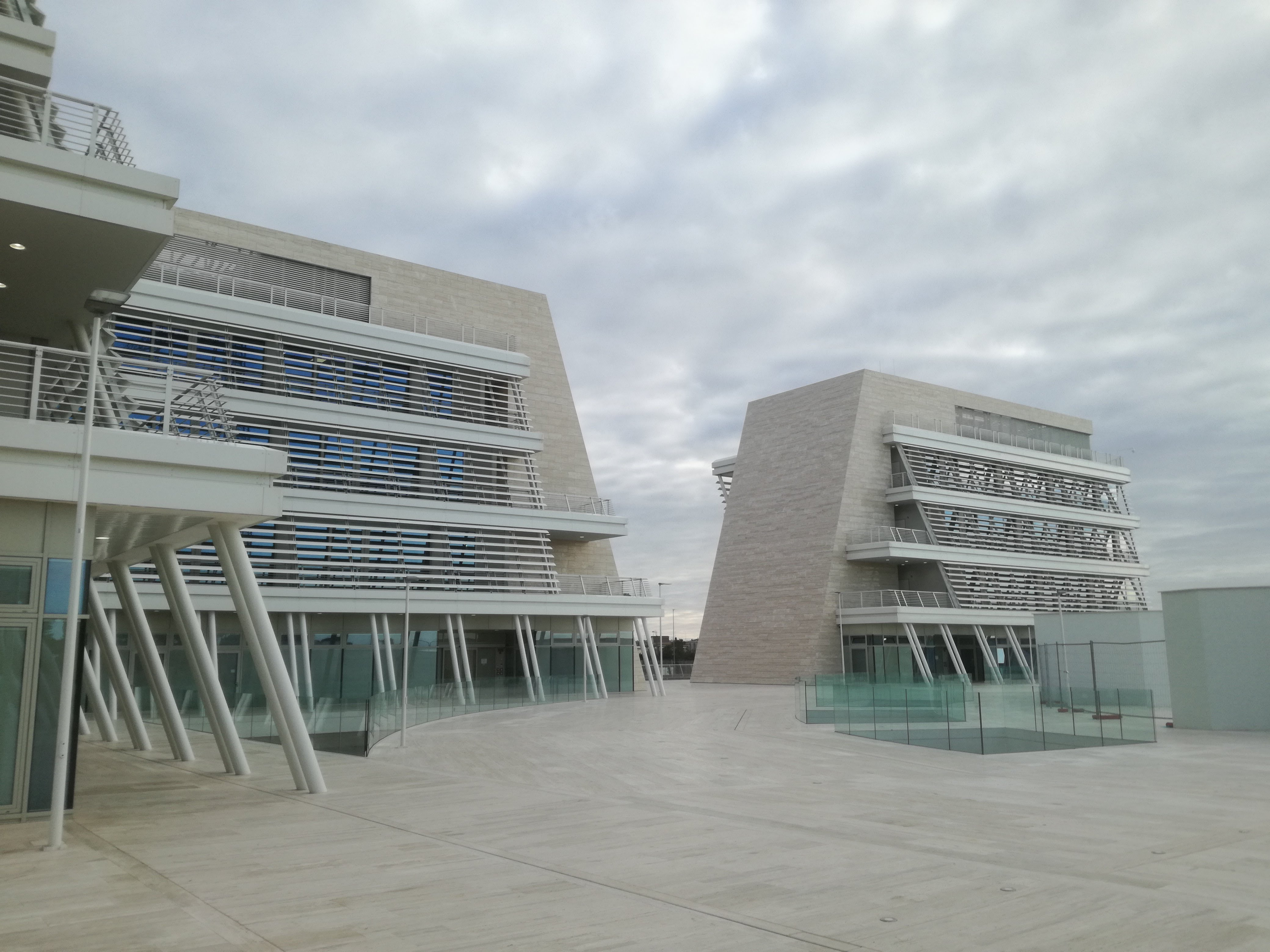 Sede del nuovo Rettorato dell'Università degli Studi di Roma "Tor Vergata"